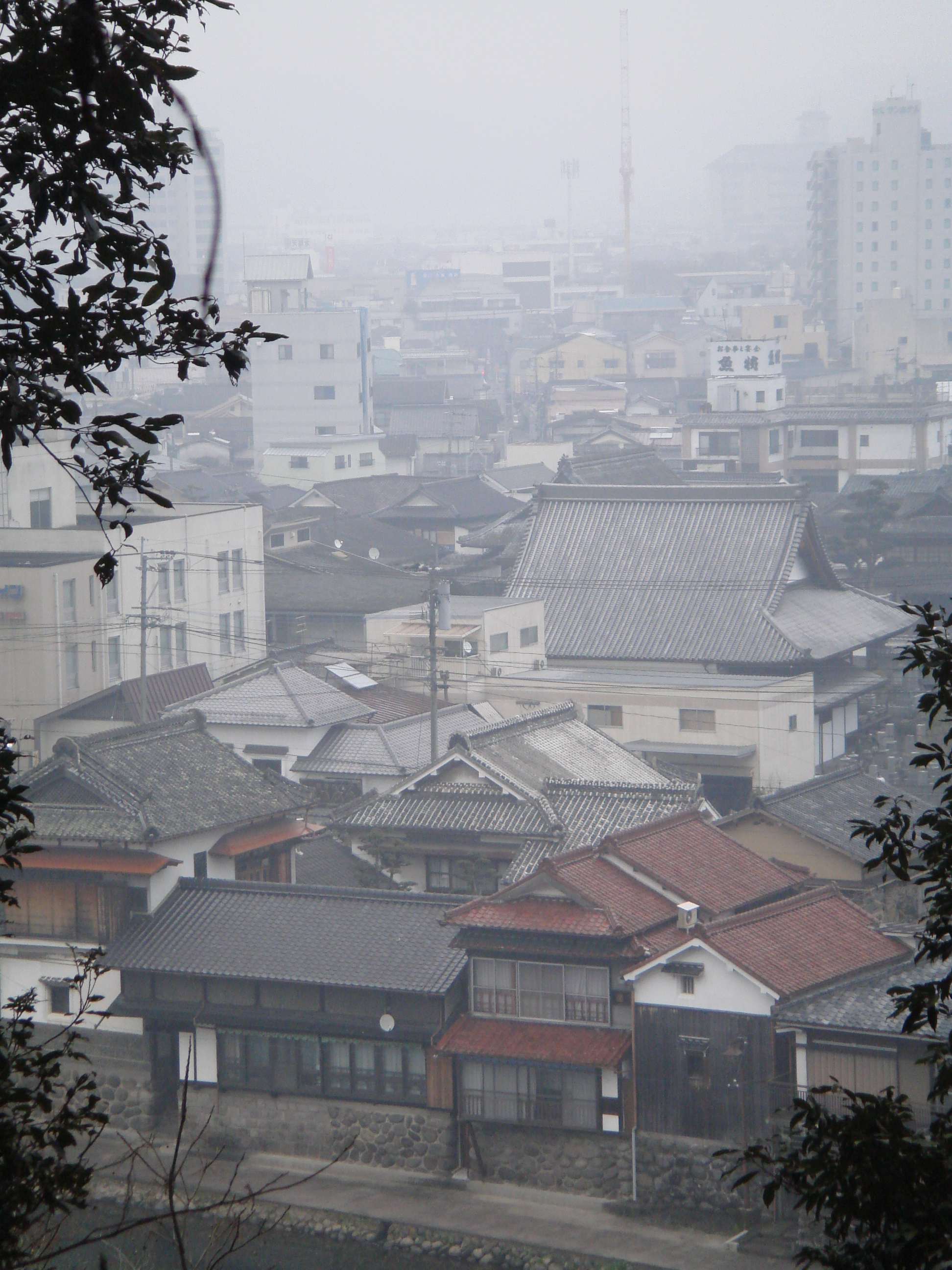 大分県日田市隈地区にある伝統的な建築。亀山公園より撮影。